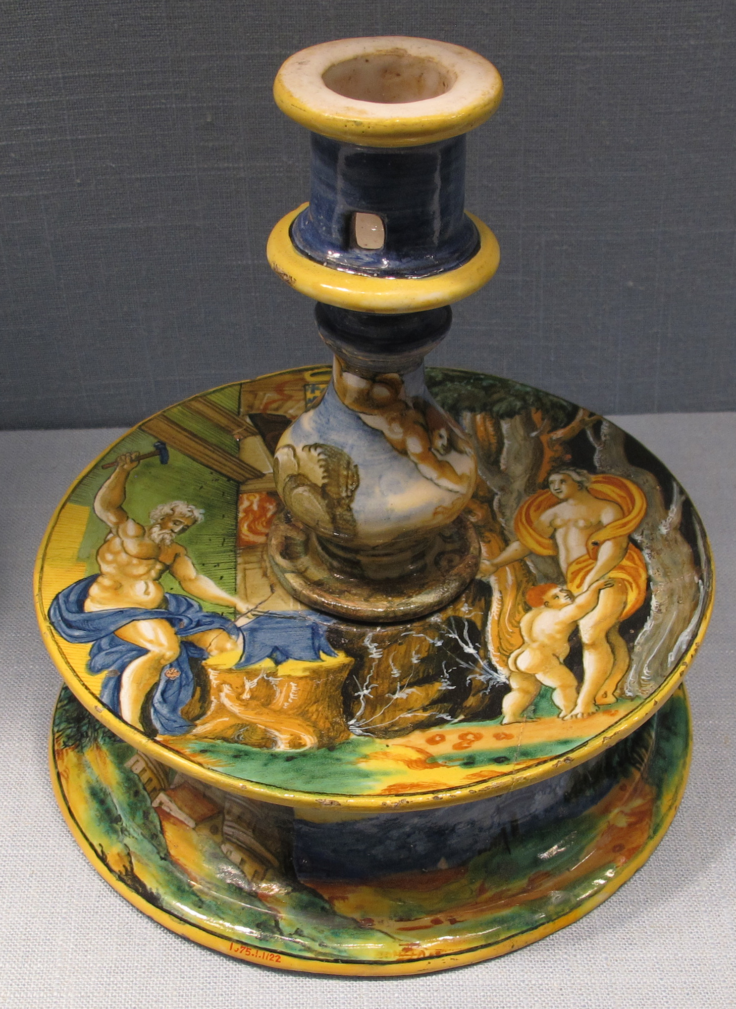 Objects d'art nel Metropolitan Museum of Art